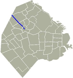 Avenida de los Constituyentes, Buenos Aires